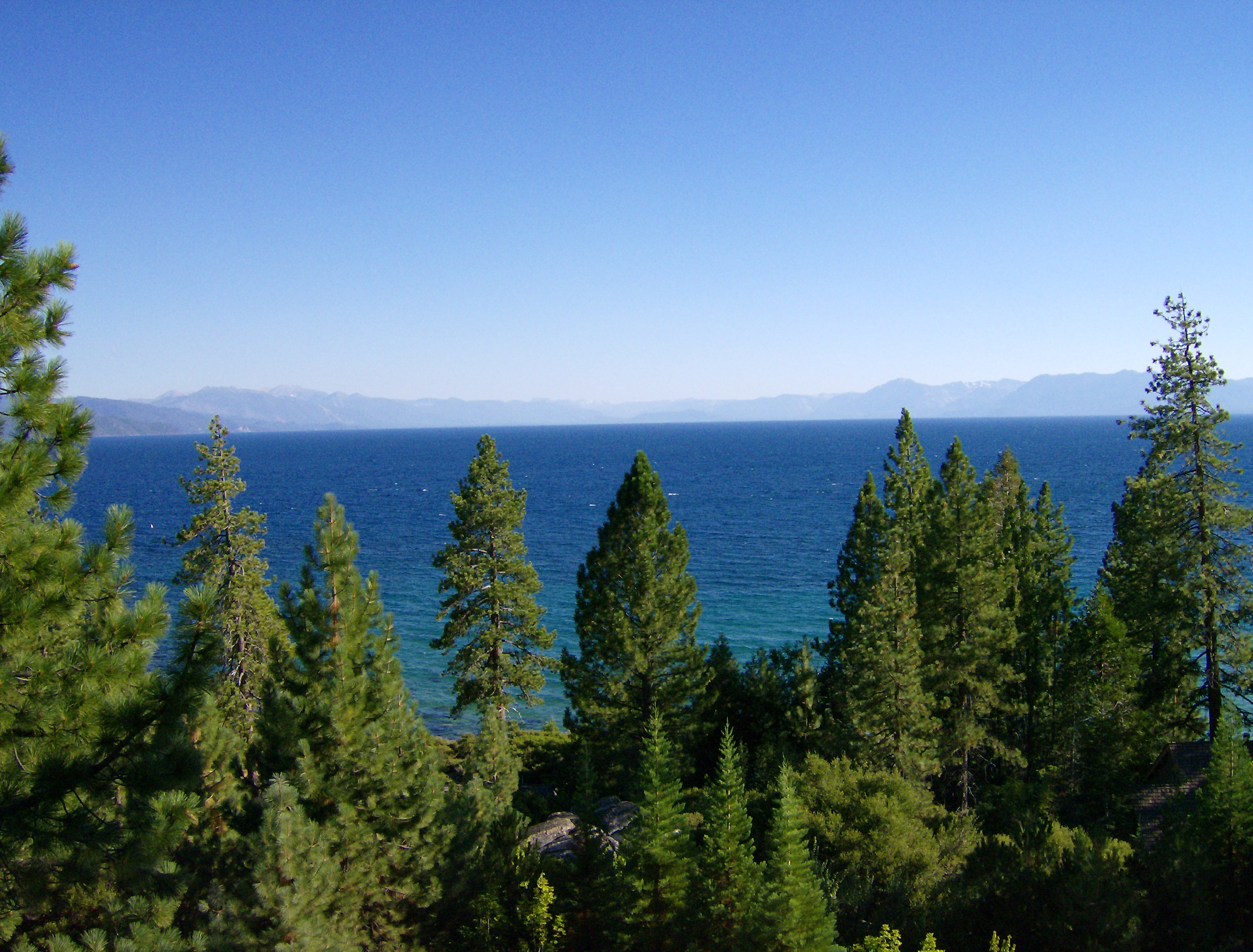 Lake Tahoe